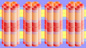 Connexon-Gruppe